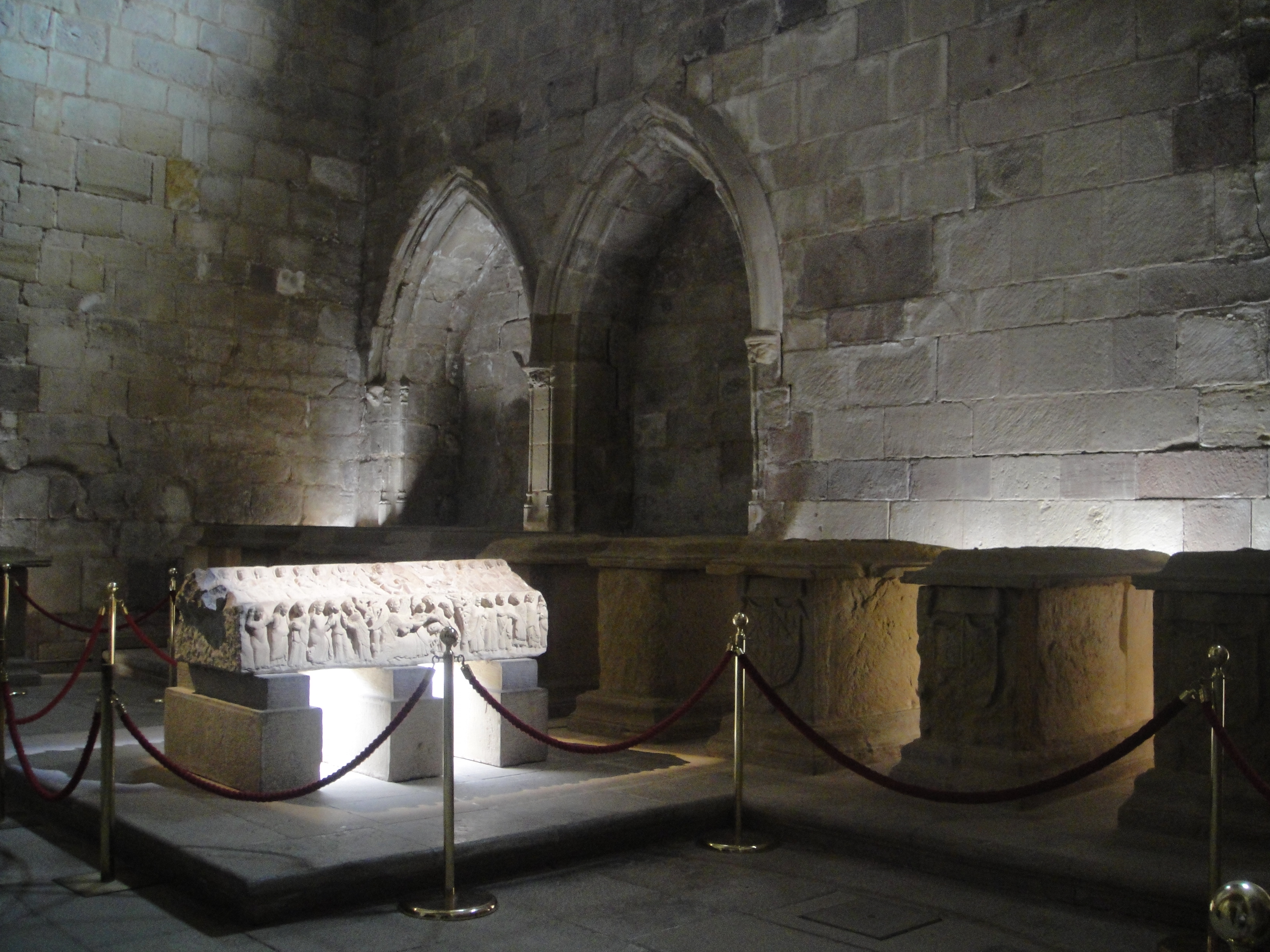 Tapa del sepulcro de la reina Blanca Garcés de Navarra, madre de Alfonso VIII de Castilla, y panteón de infantes del monasterio de Nájera.